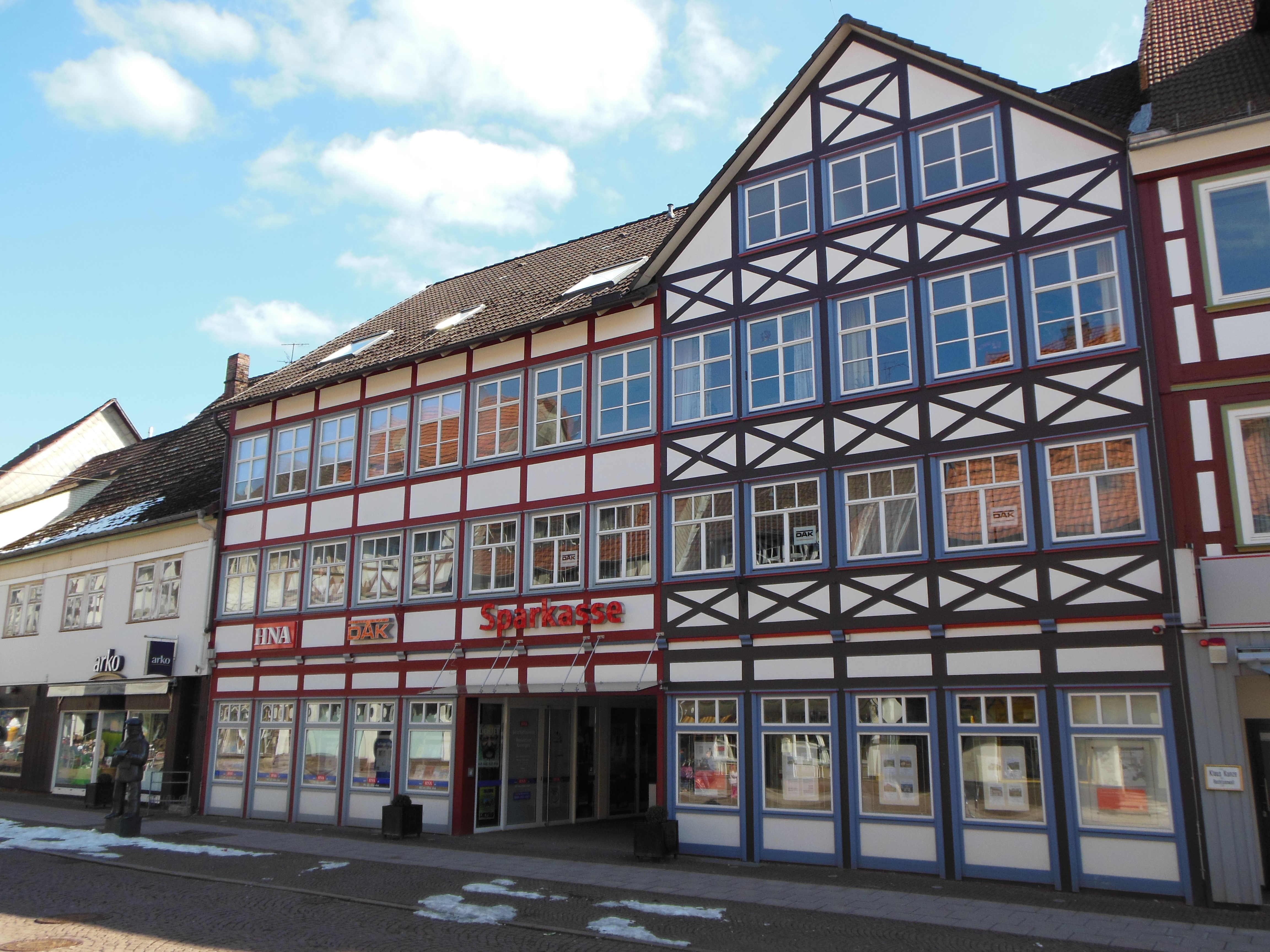 Kreis-Sparkasse Northeim, Geschäftsstelle in 37170 Uslar, Deutschland, Lange Straße 30-32